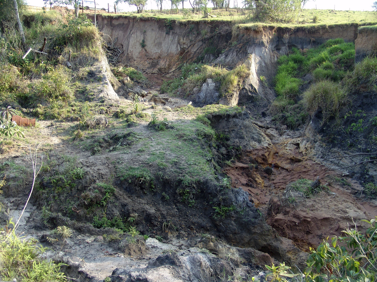 Voçoroca ou Boçoroca (iby=terra e soroc=fenda) em Avaré, Brasil. Localização geográfica: Lat. 23º12'24" sul e Long. 48º47'59" oeste